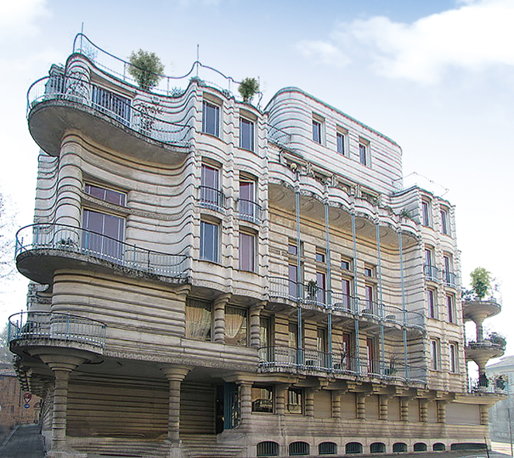 Casa dell'Obelisco, piazza Crimea (Torino)